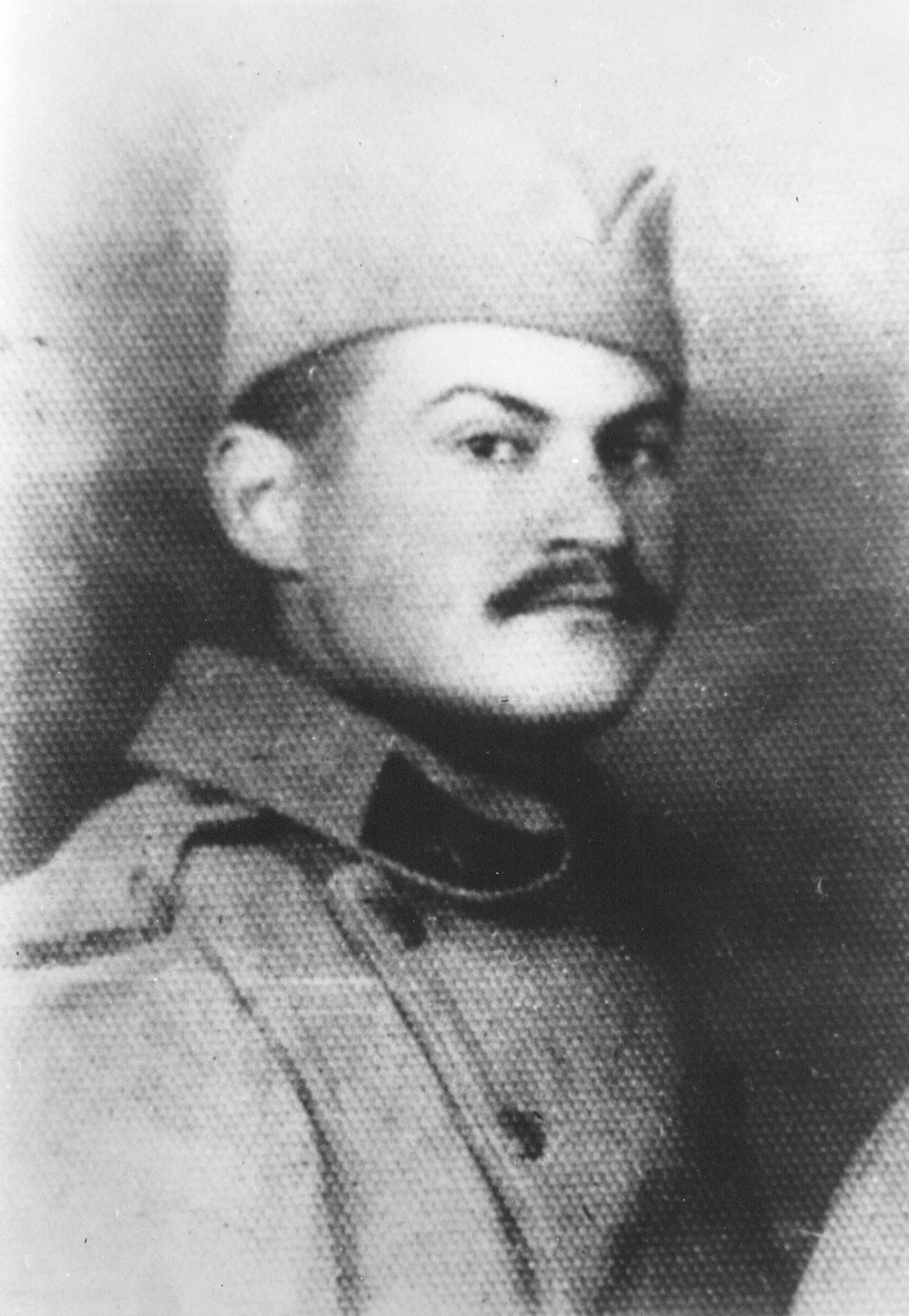 Srpskohrvatski / српскохрватски: Momčilo Mole Radosavljević je bio prvi komandant Čačanskog partizanskog odreda.